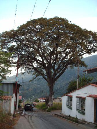 saman de escuque en la parte sur del pueblo